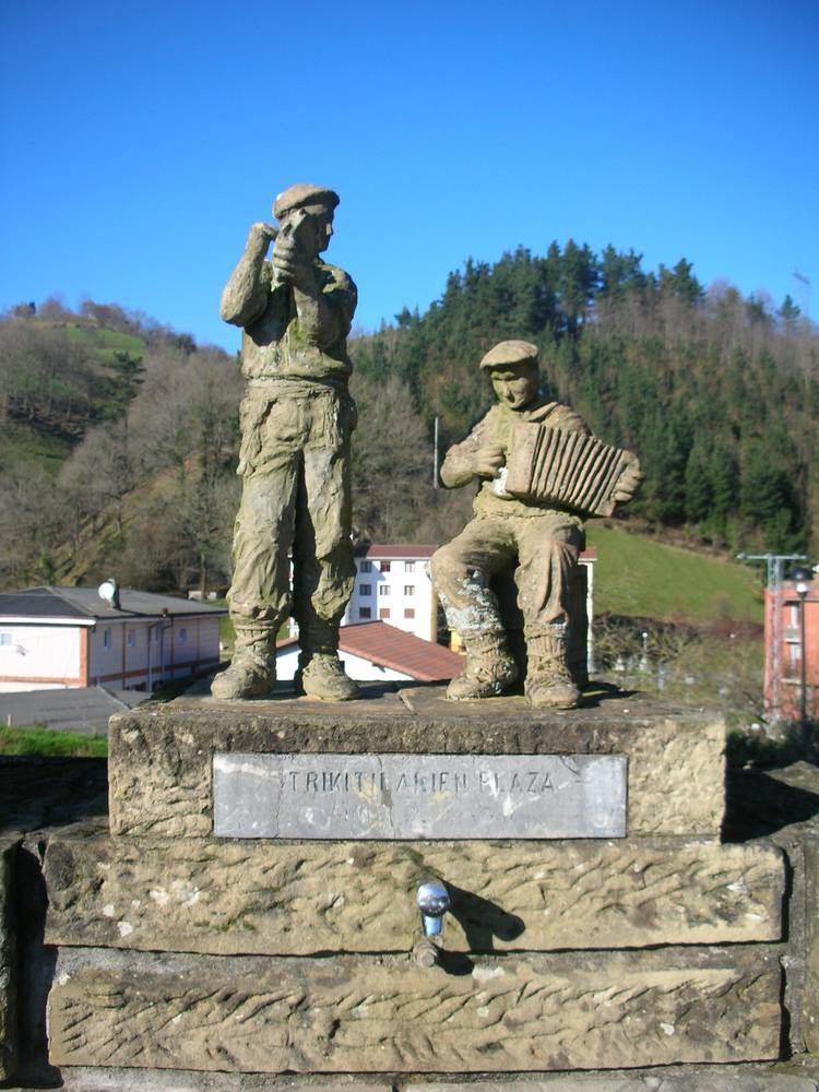 Trikitilarien plaza, Andatza, Aia